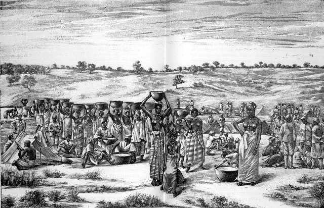 Colonnes d'opération dans le haut Sénégal. Camp des tirailleurs (illustration de Côte occidentale d'Afrique du Colonel Frey, Pl. en dble page après p. 203)